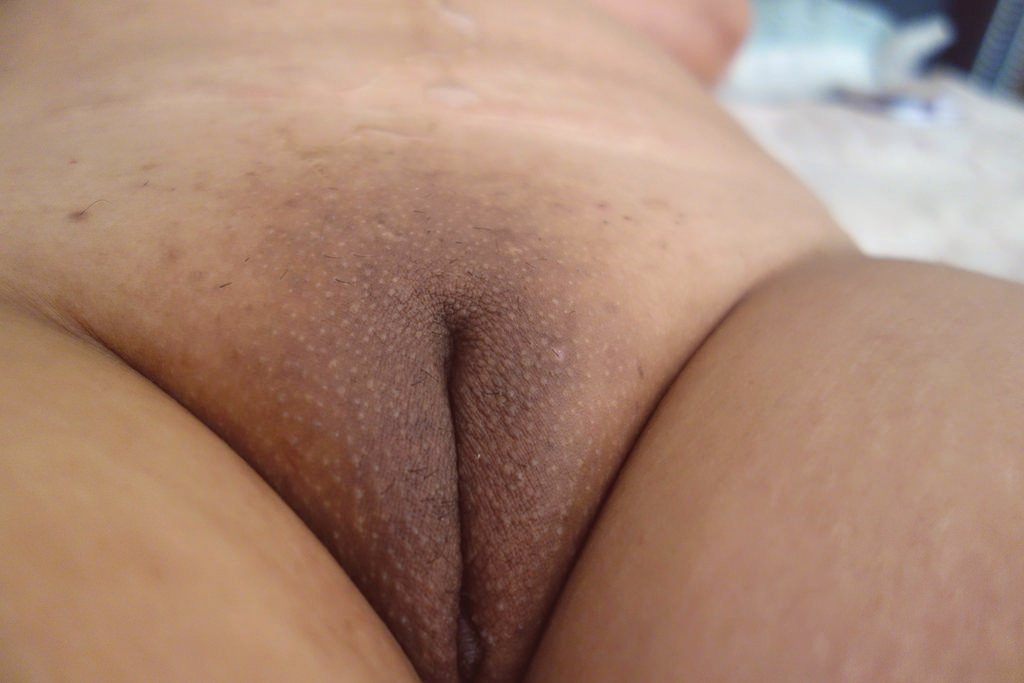 Schamspalte